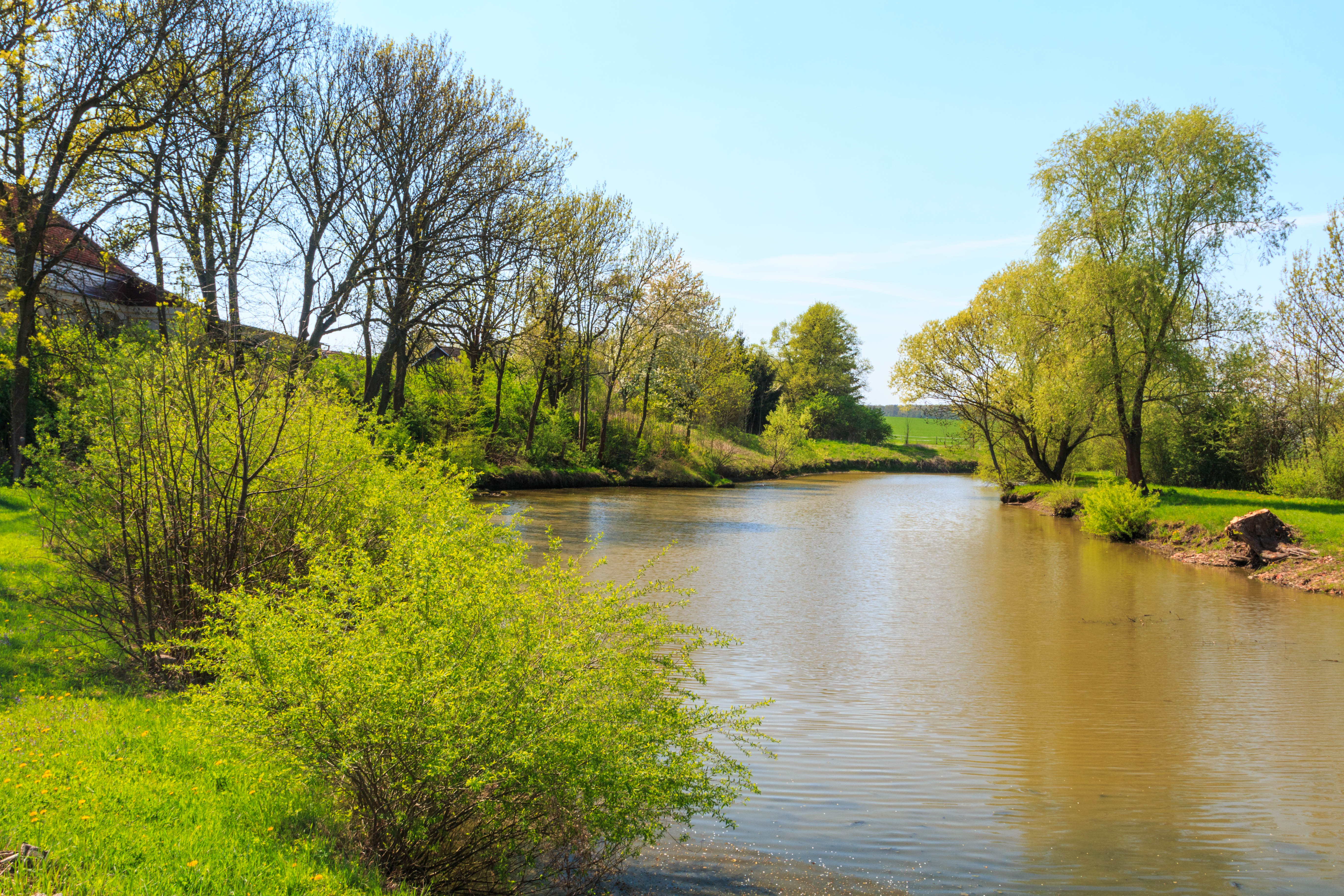 Chmelovický rybník Project: Vodstvo.